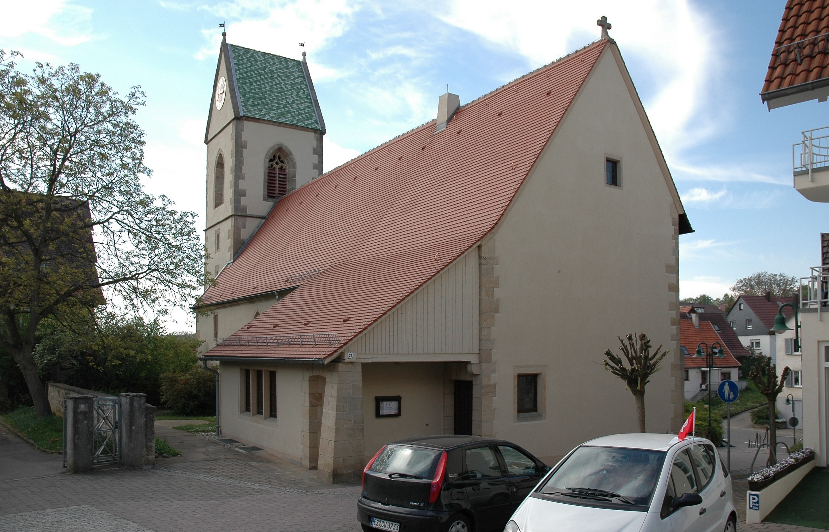 church of Schlaitdorf